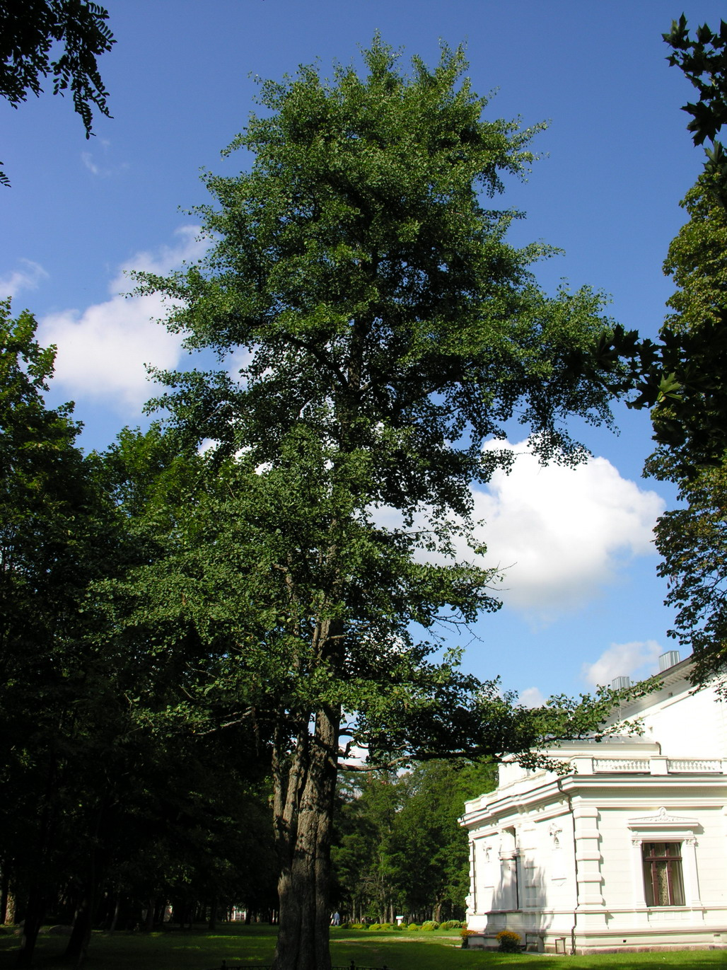 Ginkmedis Švėkšnos parke